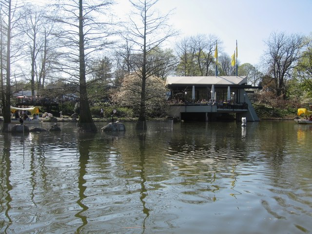 Seerestaurant